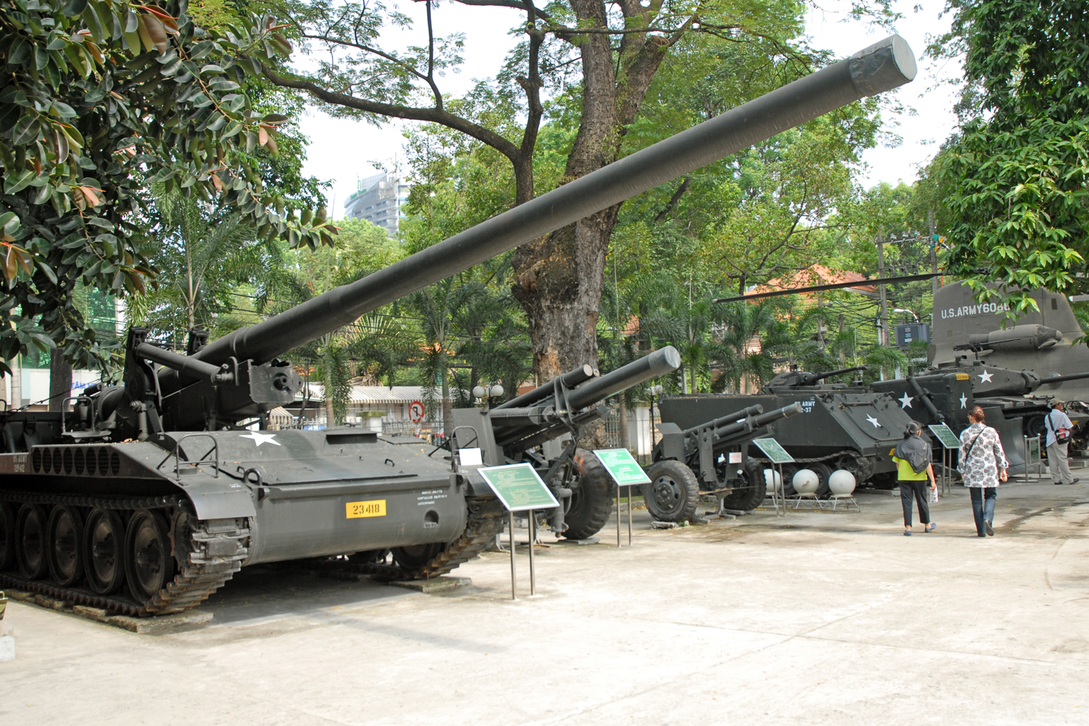 Blindés et canons de l'armée US. Au premier plan, le M107 - 175mm Gun Ce canon M107 est une pièce d'artillerie motorisée d'un poids de 23 t, de portée max 32 Km L'impact de l'obus couvre un rayon de 520 m Installé dans l'ancien bâtiment de « l'US Information Service », le musée des Souvenirs (ou Vestiges) de guerre (Bao Tang Chung Tich Chien Tranh) présente les horreurs des guerres qui se sont déroulées au Vietnam contre le colonisateur français, puis contre le Vietnam du sud et son allié américain. Des matériels militaires sont présentés devant le musée : canon de 175 mm, char M-48, hélicoptère UH-1 Bell, divers types de bombes, blindés, avions, etc.. L'exposition présente de nombreuses photos témoignant des exactions effectuées par l'armée US, comme le massacre de My Lai ou l'utilisation intensive des défoliants (agent orange,..), des bombes incendiaires (napalm,..), avec leurs conséquences sur la population (malformations, brulures, lésions,..). Une partie de l'exposition est consacrée à la guerre contre l'armée française.